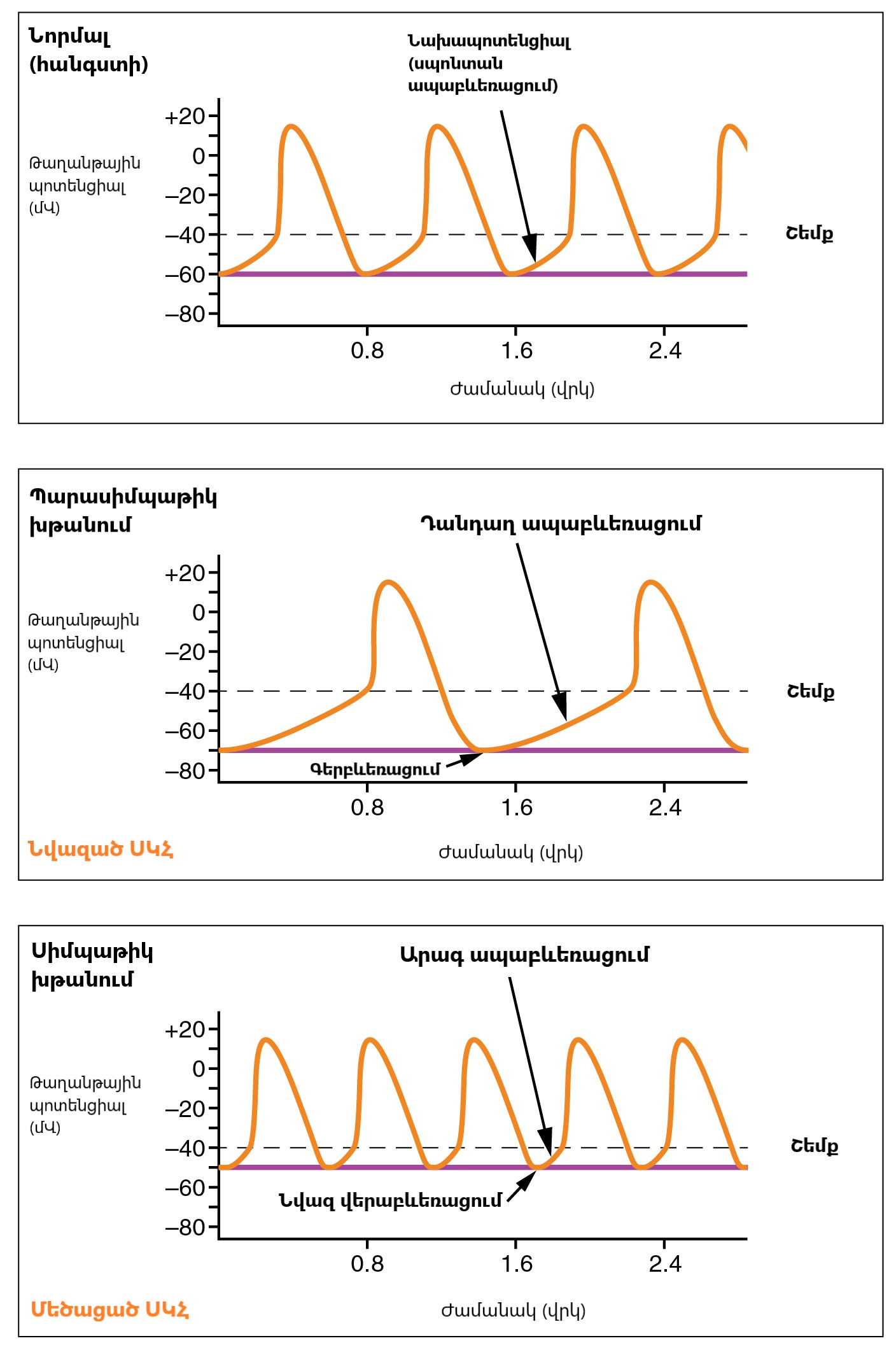 Սրտի ապաբևեռացումը սիմպաթիկ ու պարասիմպաթիկ խթանման ժամանակ